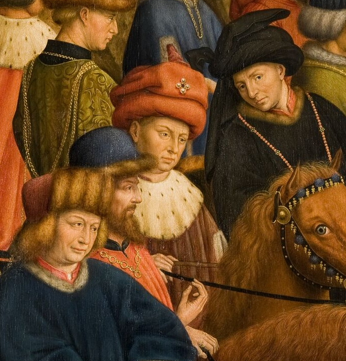 Ausschnitt aus den Gerechten Richtern des Genter Altares (Kopie). Die Personen links vorn und rechts hinten werden nach einer Genter Tradition als Hubert und Jan van Eyck gedeutet.